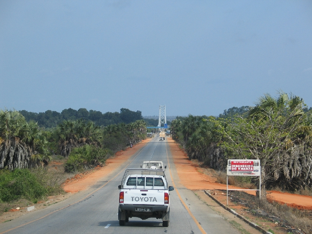 Brücke über den Cuanza an der Strasse von Luanda nach Lobito, Angola